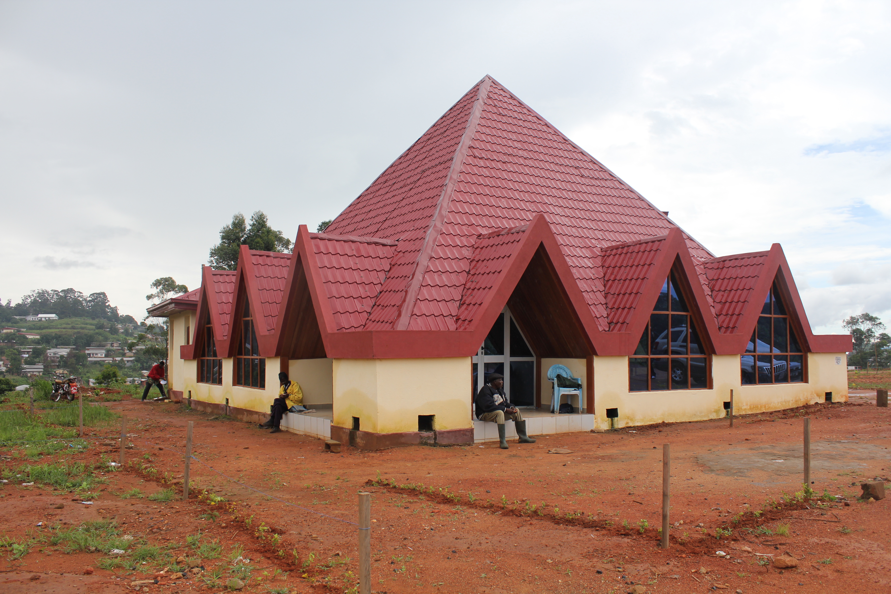 Bamenda III Council Hall